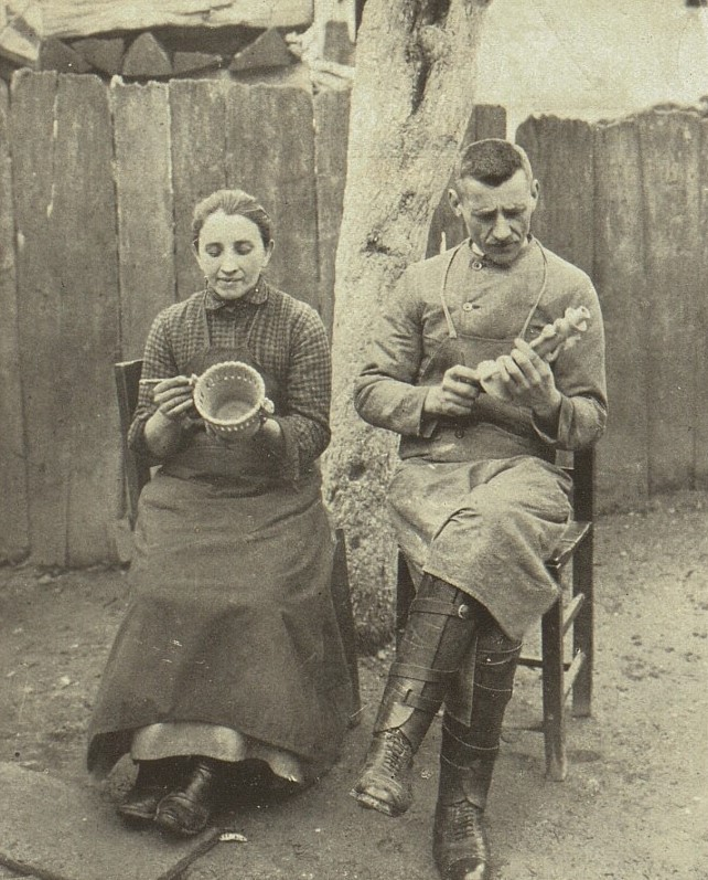 Lidový řezbář Ferdiš Kostka (1878-1951) se sestrou